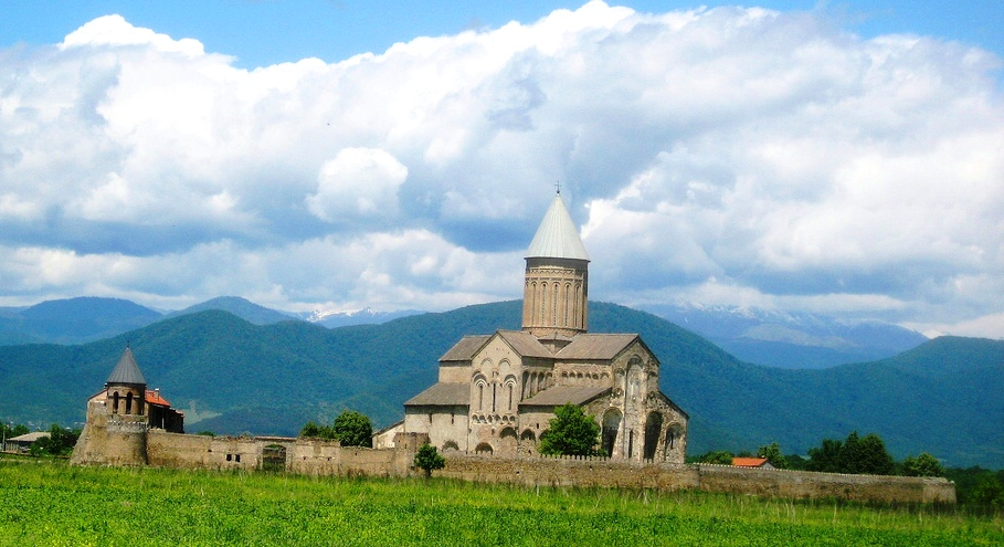 ალავერდი